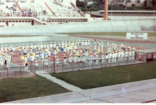 Esquemas de piso en el Velódromo "Teo Capriles" de Caracas año 1989